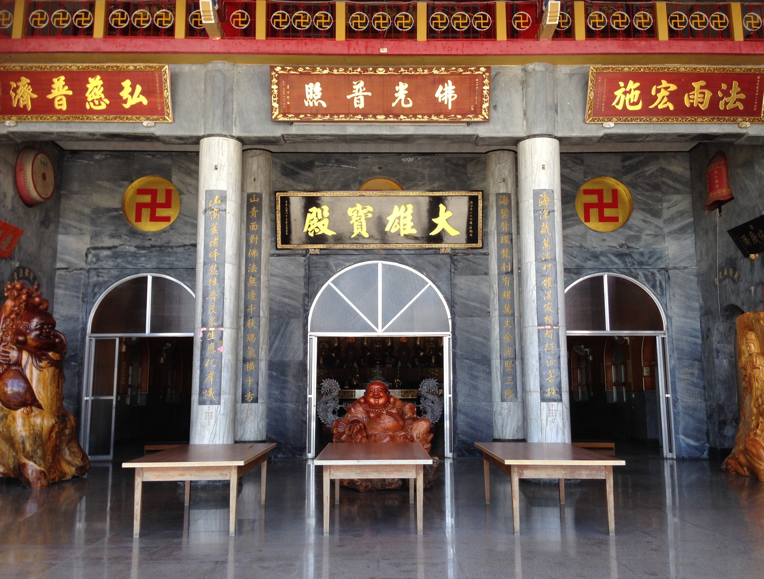 中文（台灣）: 海山寺大雄寶殿內